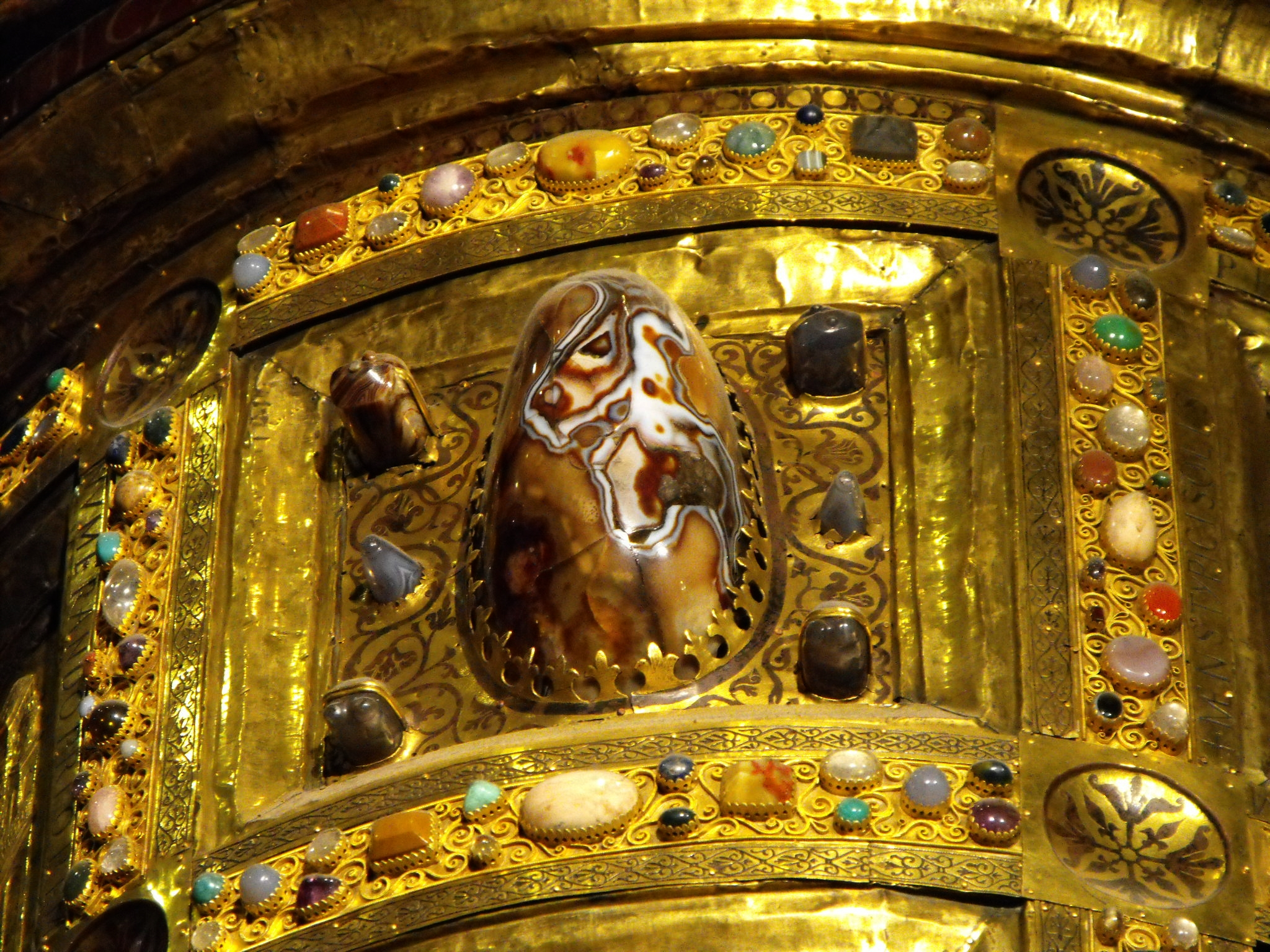 Detail der mit Halbedelsteinen verzierten Heinrichskanzel